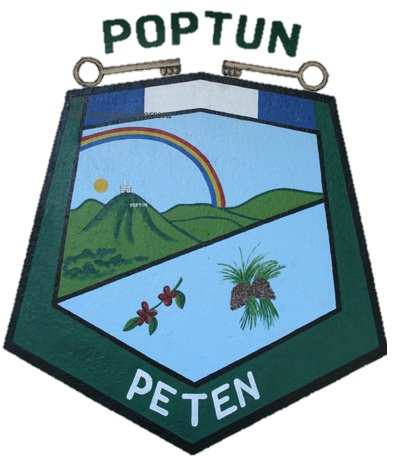 Escudo del municipio de Poptún, Petén, Guatemala